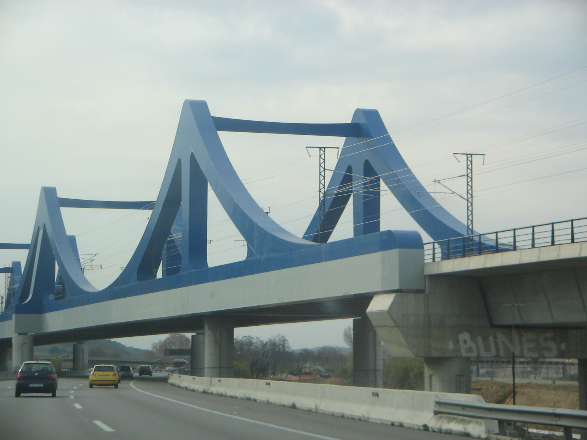 AP-7 AVE